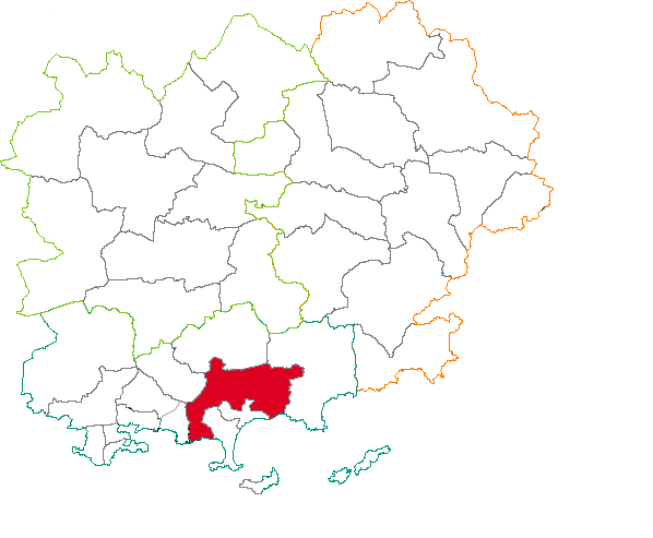 Situation du canton dans le département du Var (83) France